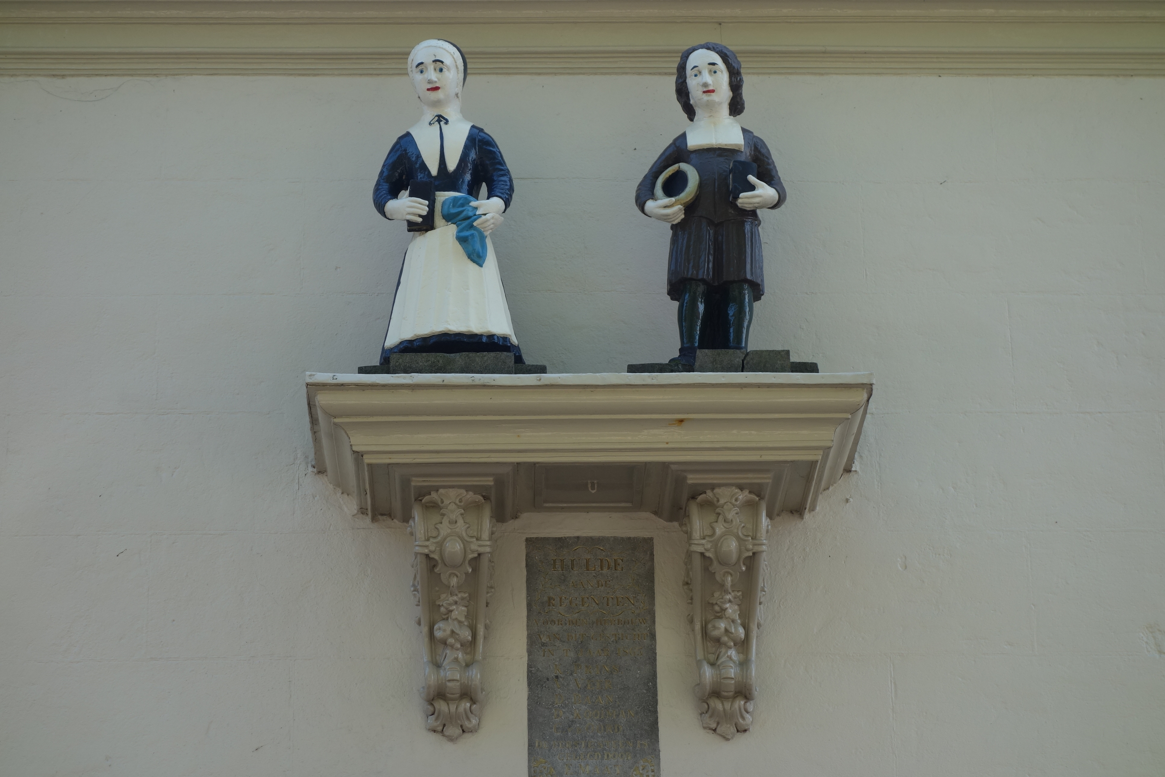 Weeskinderen boven ingang van De Schuilhoeve in Grootebroek